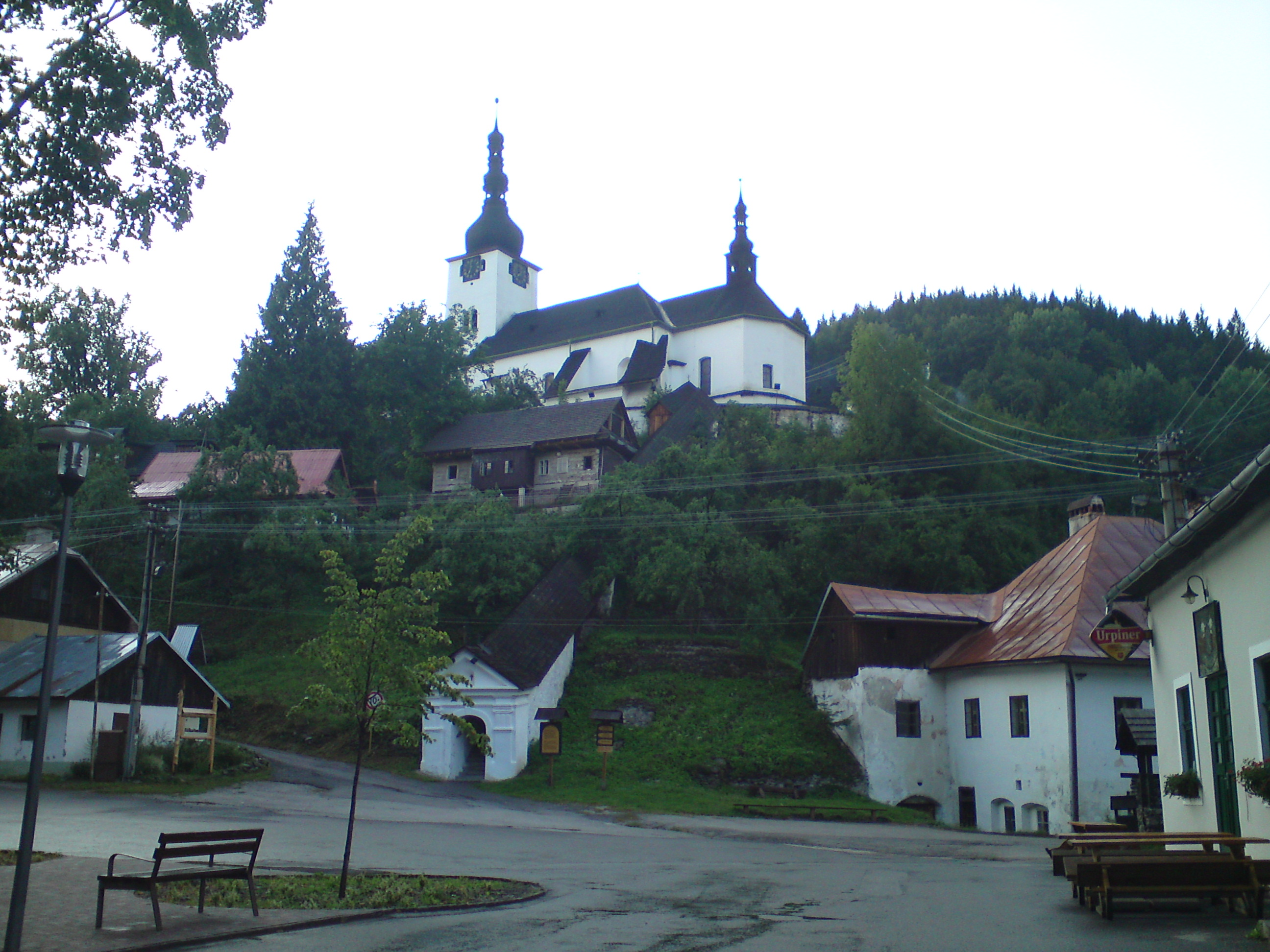 Pohlad z namestia